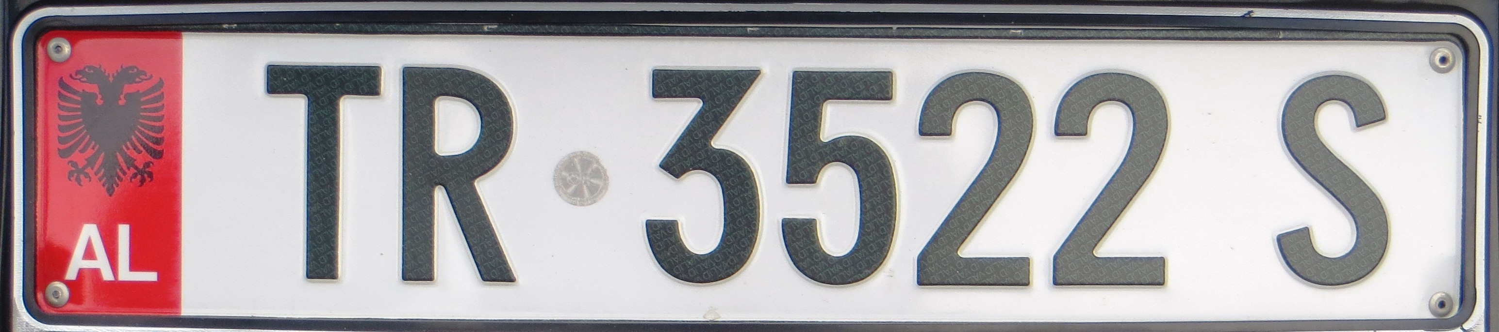 Kentekenplaat Albanië